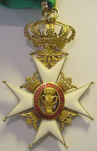 Fotografia cyfrowa egzemplarza z wlasnych zbiorow (Wikipedysta:Alexvonf) june 2007